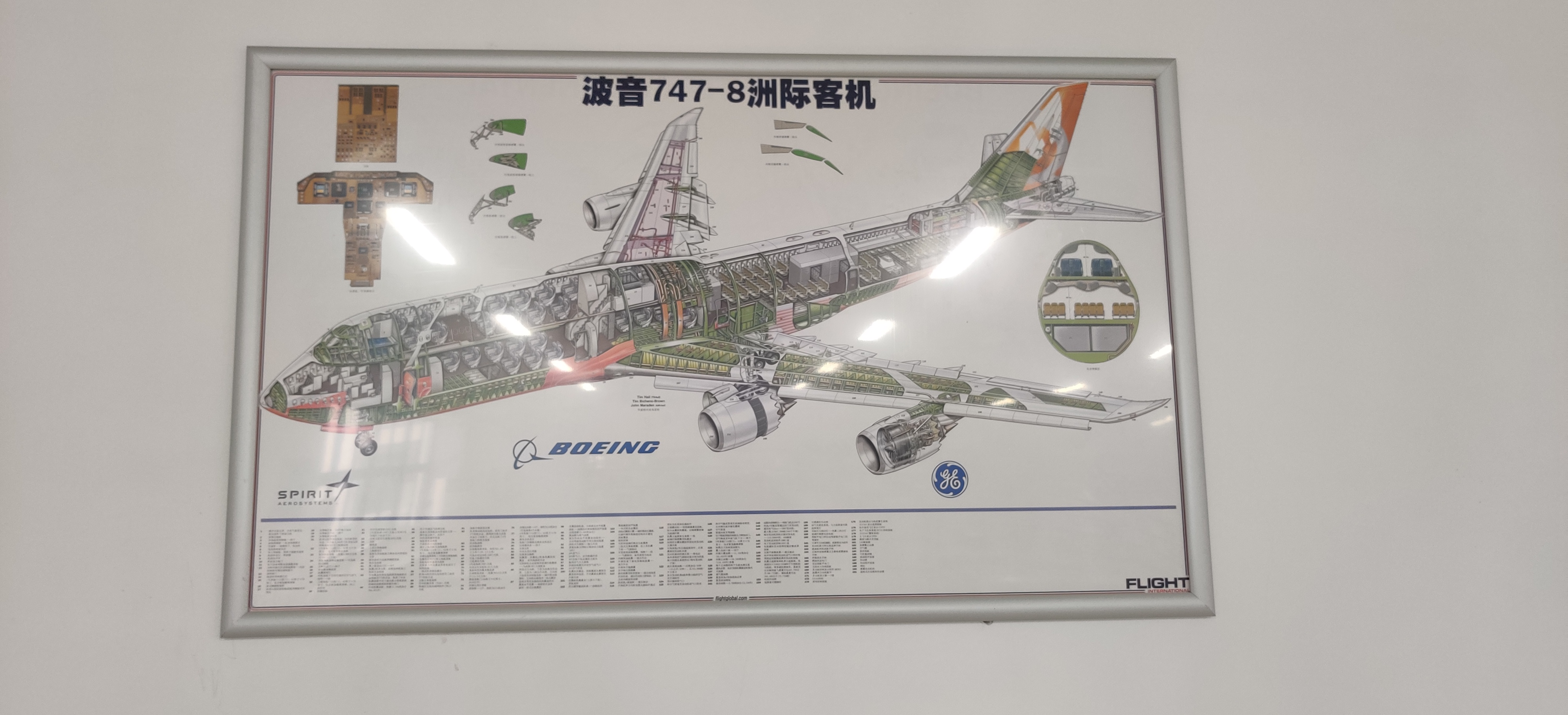 中文（中国大陆）: 置于广州民航职业技术学院花都赤坭校区图书馆的波音747-8结构图